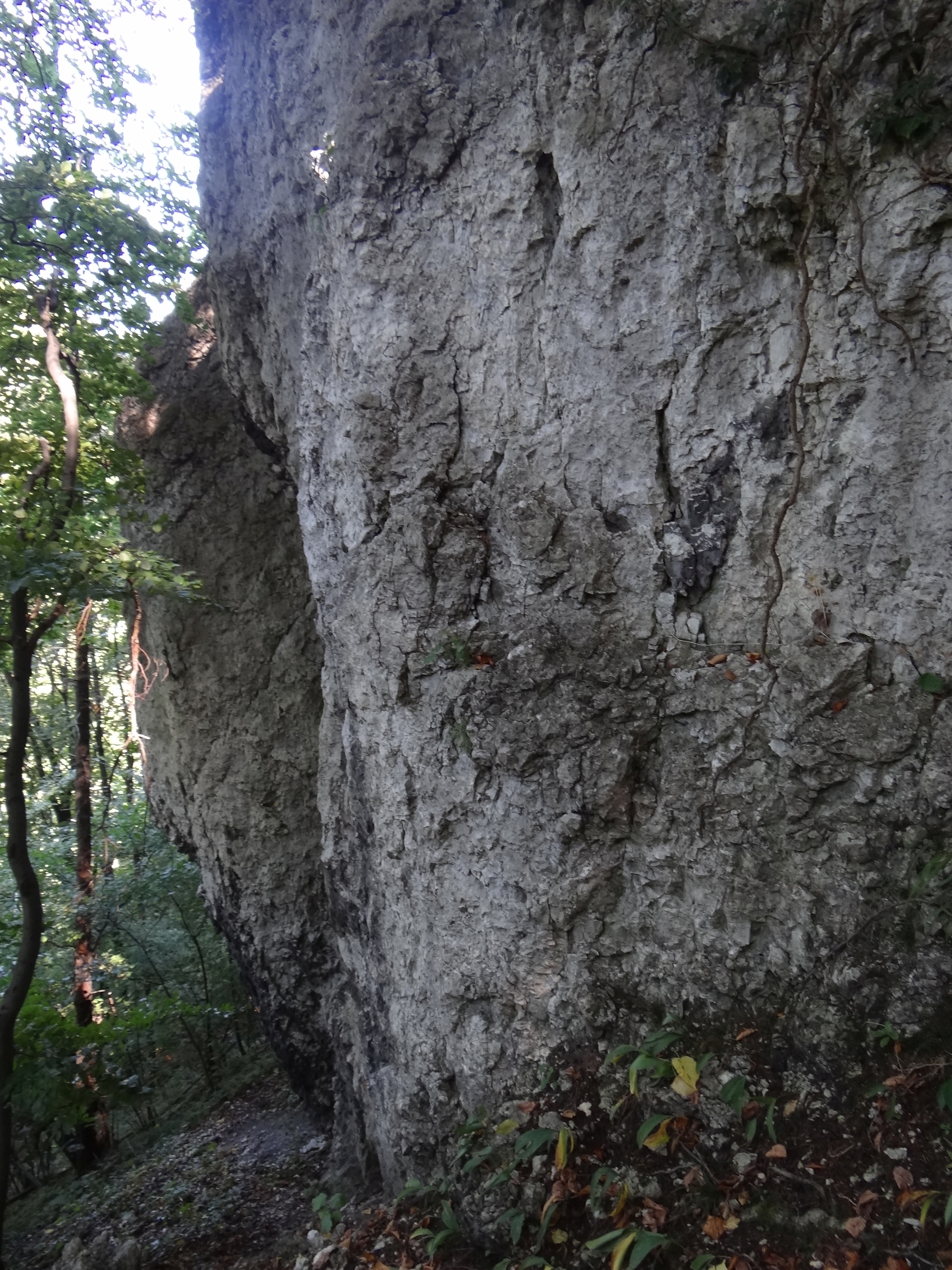 Skała poniżej Skały nad Źródłem w Dolinie Będkowskiej